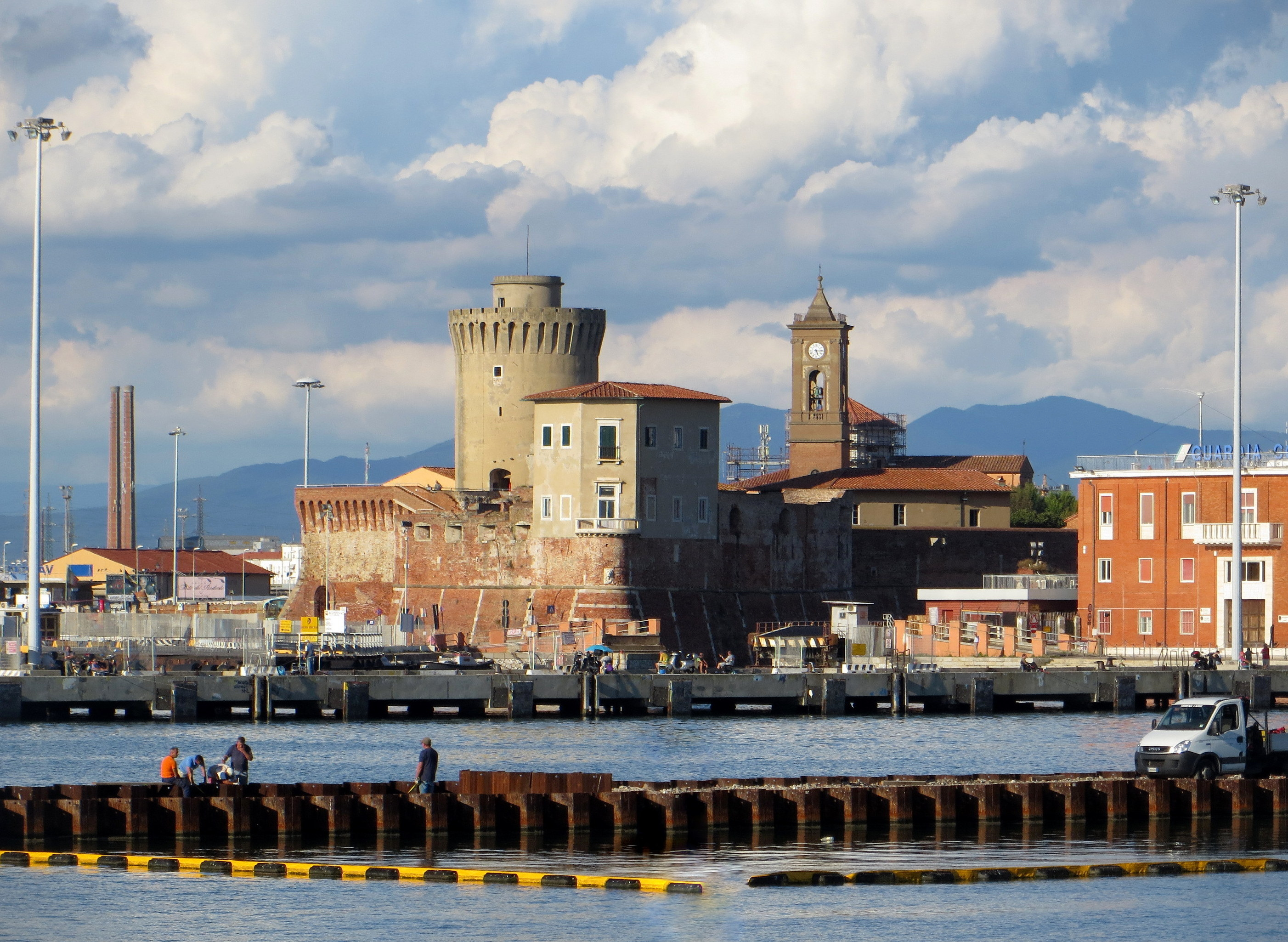 Panorama di Livorno dal Molo Mediceo: a sinistra il Mastio di Matilde nella Fortezza Vecchia e a destra il campanile di San Ferdinando